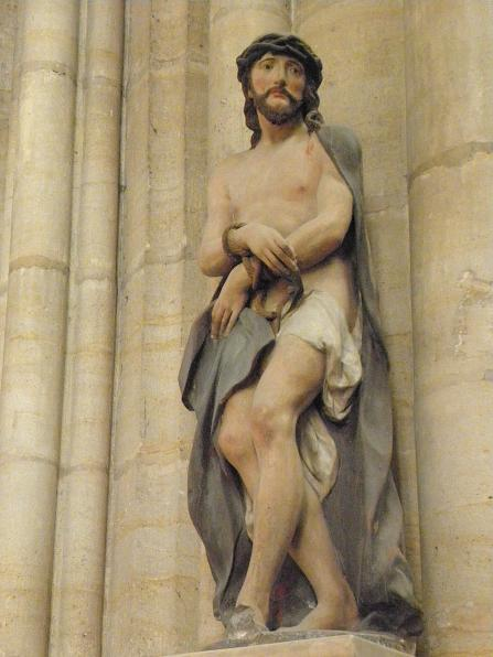 Ecce Homo. Statue de la basilique Saint-Urbain de Troyes (10).